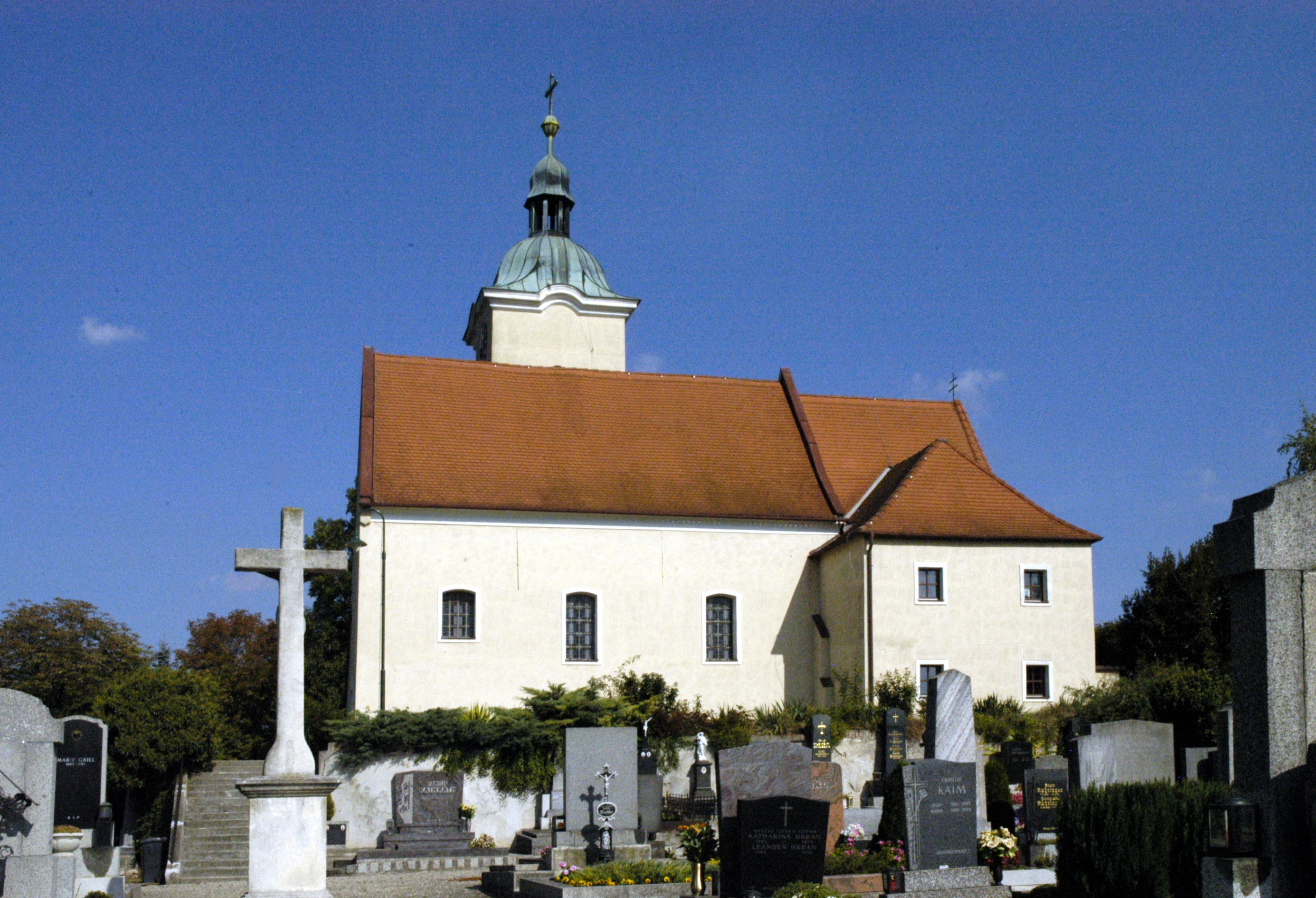 katholische Pfarrkirche heiliger Leonhard in Oberstinkenbrunn, Gemeinde Wullersdorf